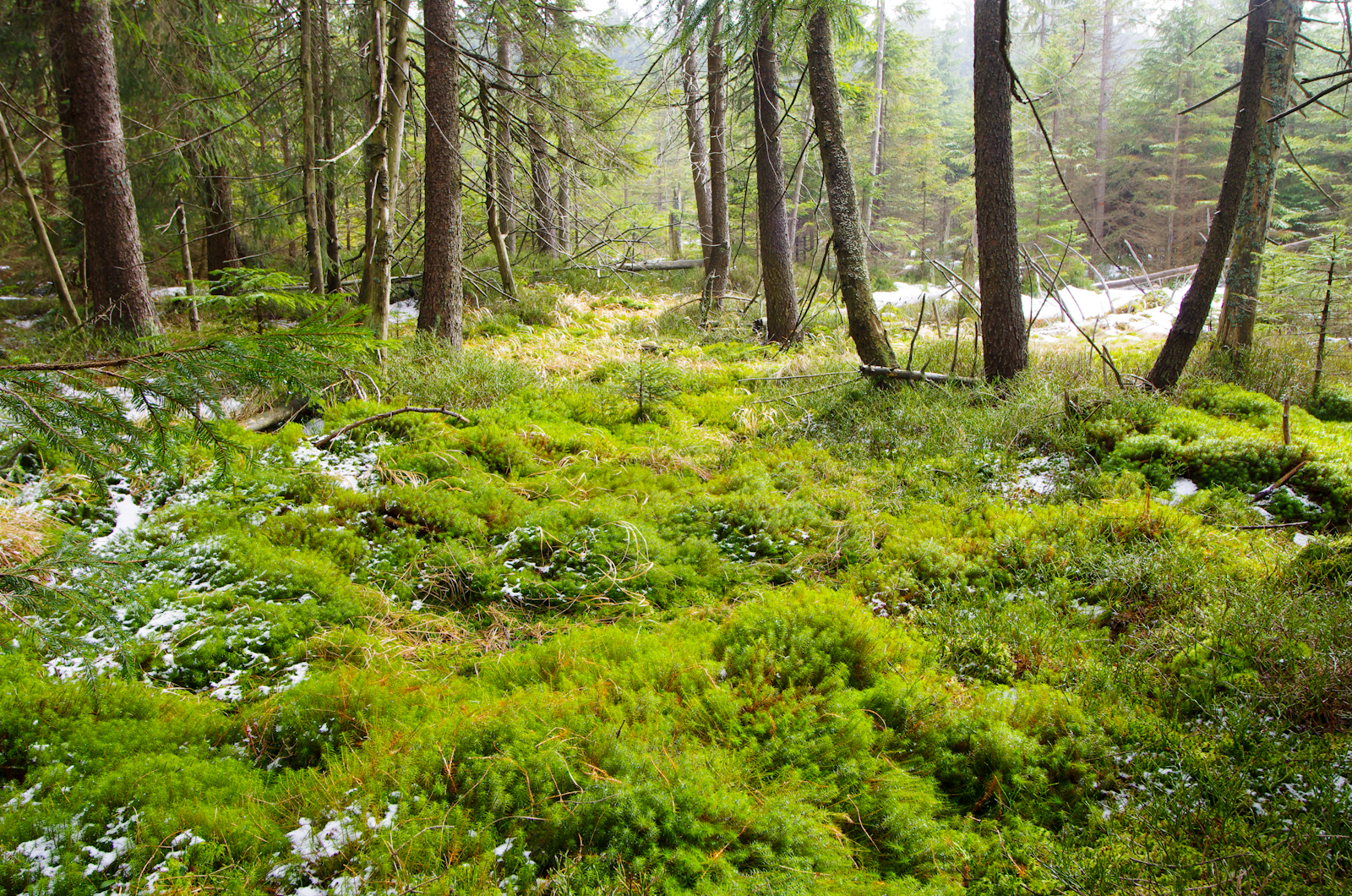 Národní přírodní rezervace Kladské rašeliny - lokalita Lysina, její jihozápadní okraj, Slavkovský les, okres Cheb